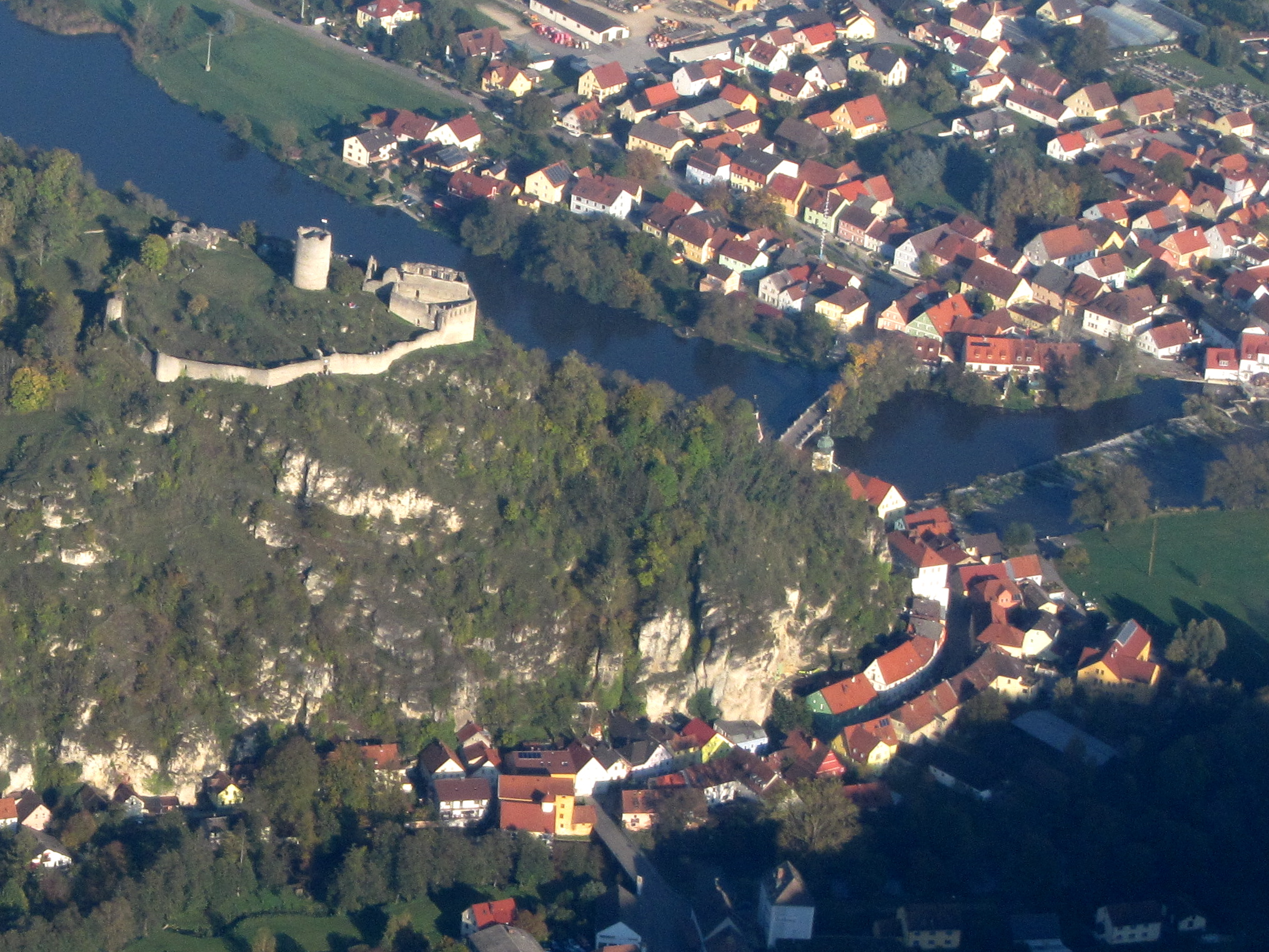 Burgruine Kallmünz, Deutschland, Bayern, Oberpfalz